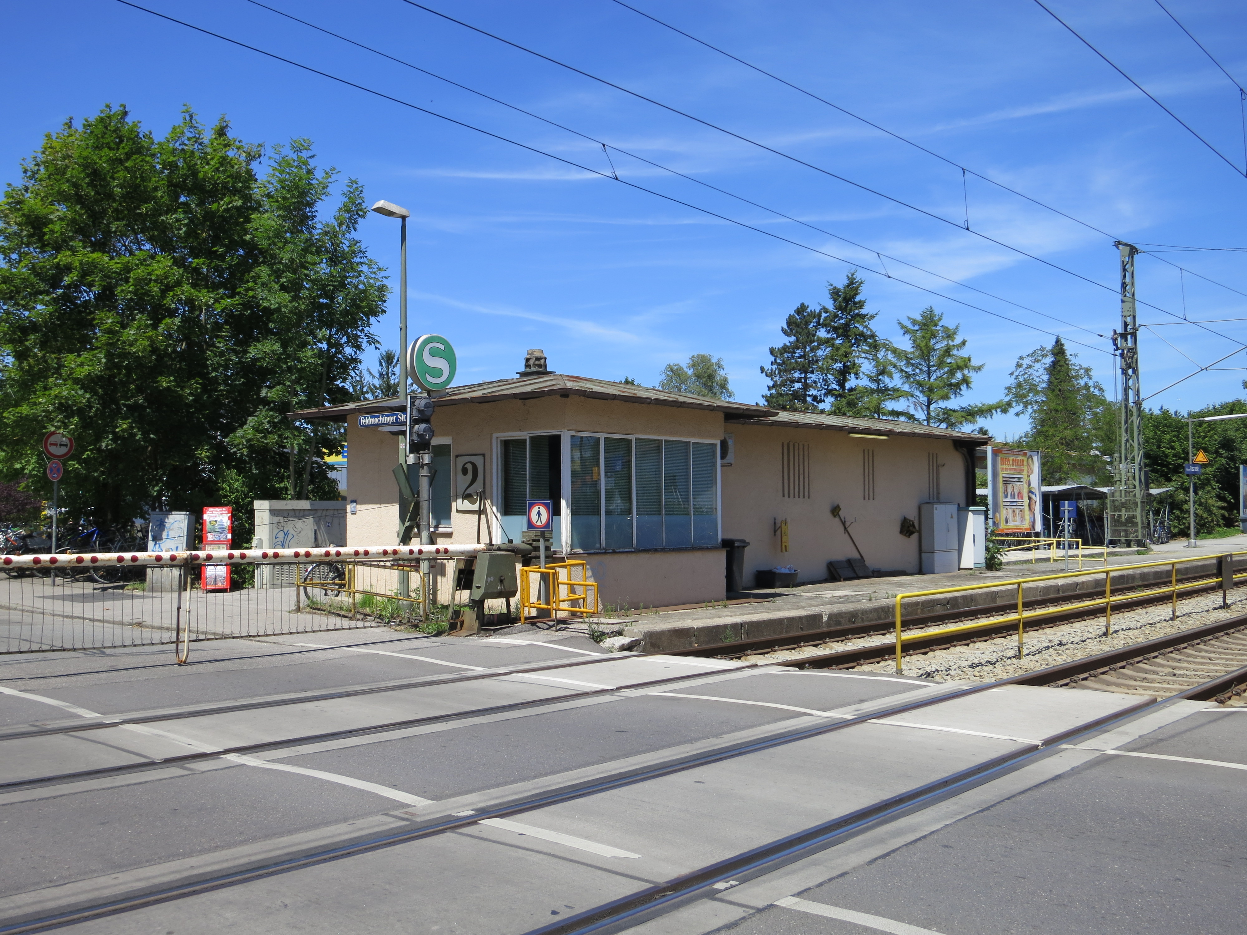 Schrankenposten 2 am Bahnübergang des S-Bahn-Haltepunkts München-Fasanerie